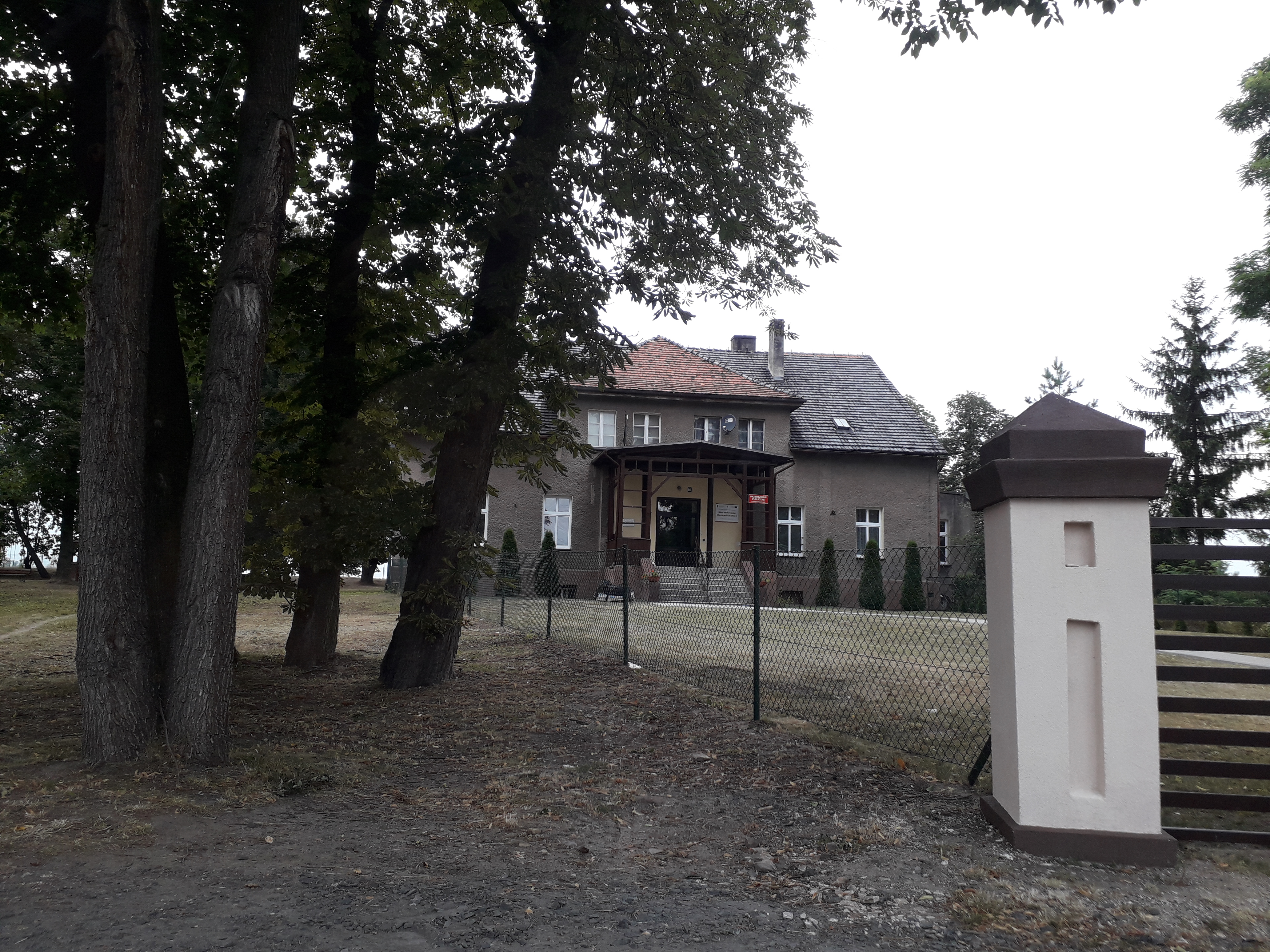 Przedszkole w Ździechowicach